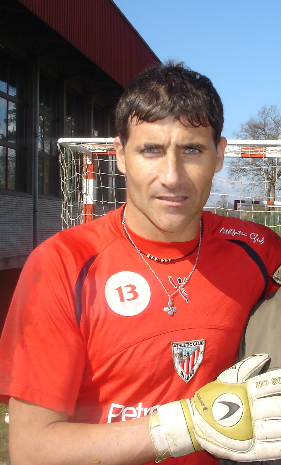 Armando Ribeiro de Aguiar Malda. Ex portero de Athletic y Cádiz.